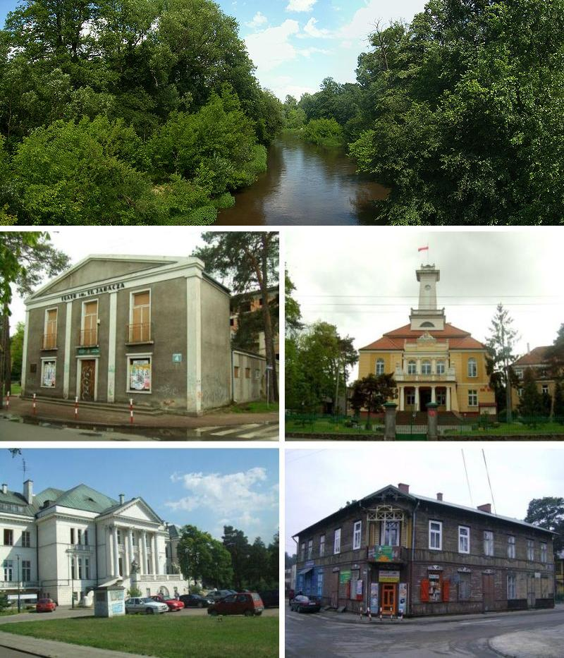 wizytówka Otwocka